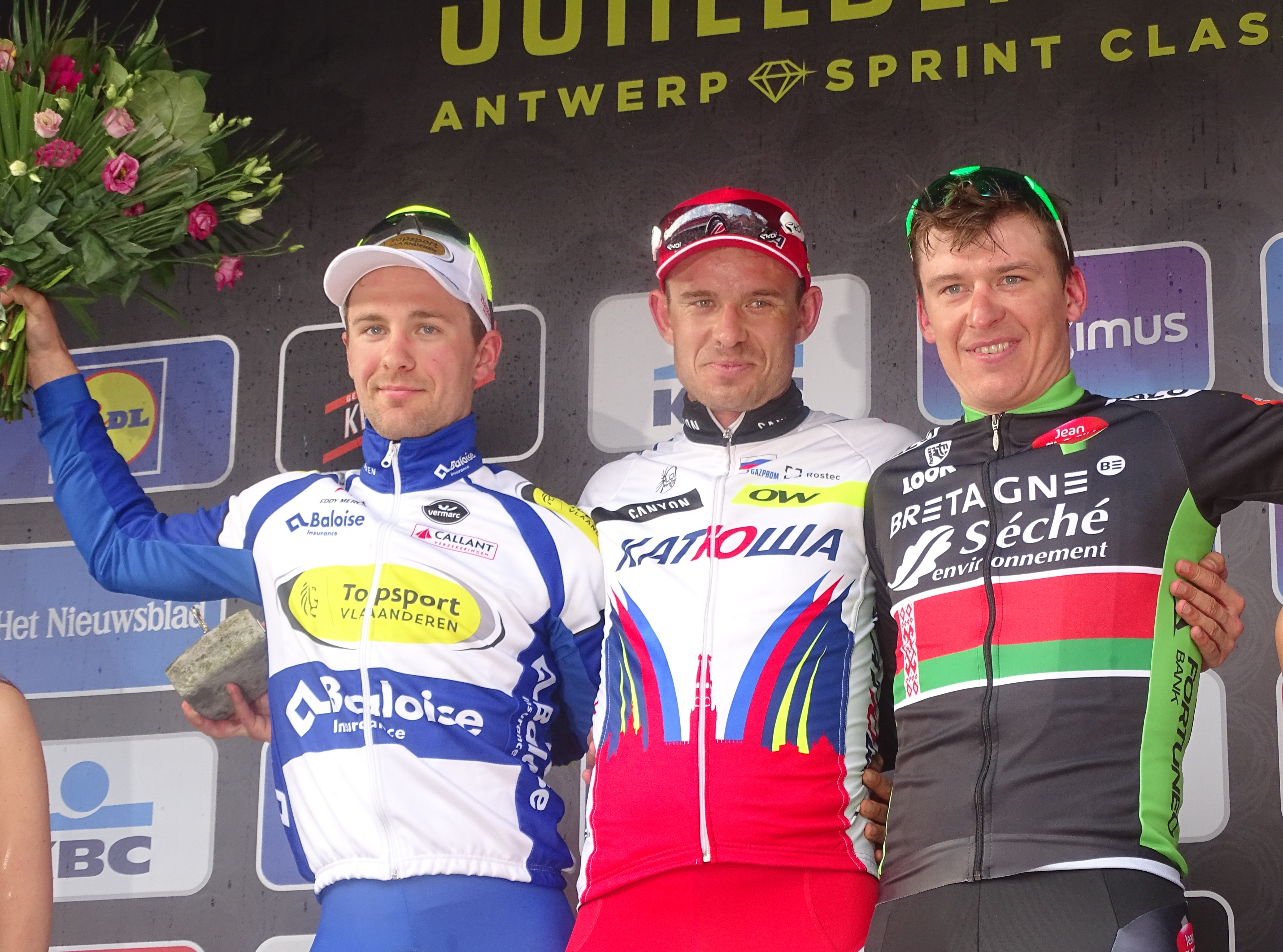 Reportage réalisé le mercredi 8 avril à l'occasion de l'arrivée du Grand Prix de l'Escaut 2015 à Schoten, Belgique.